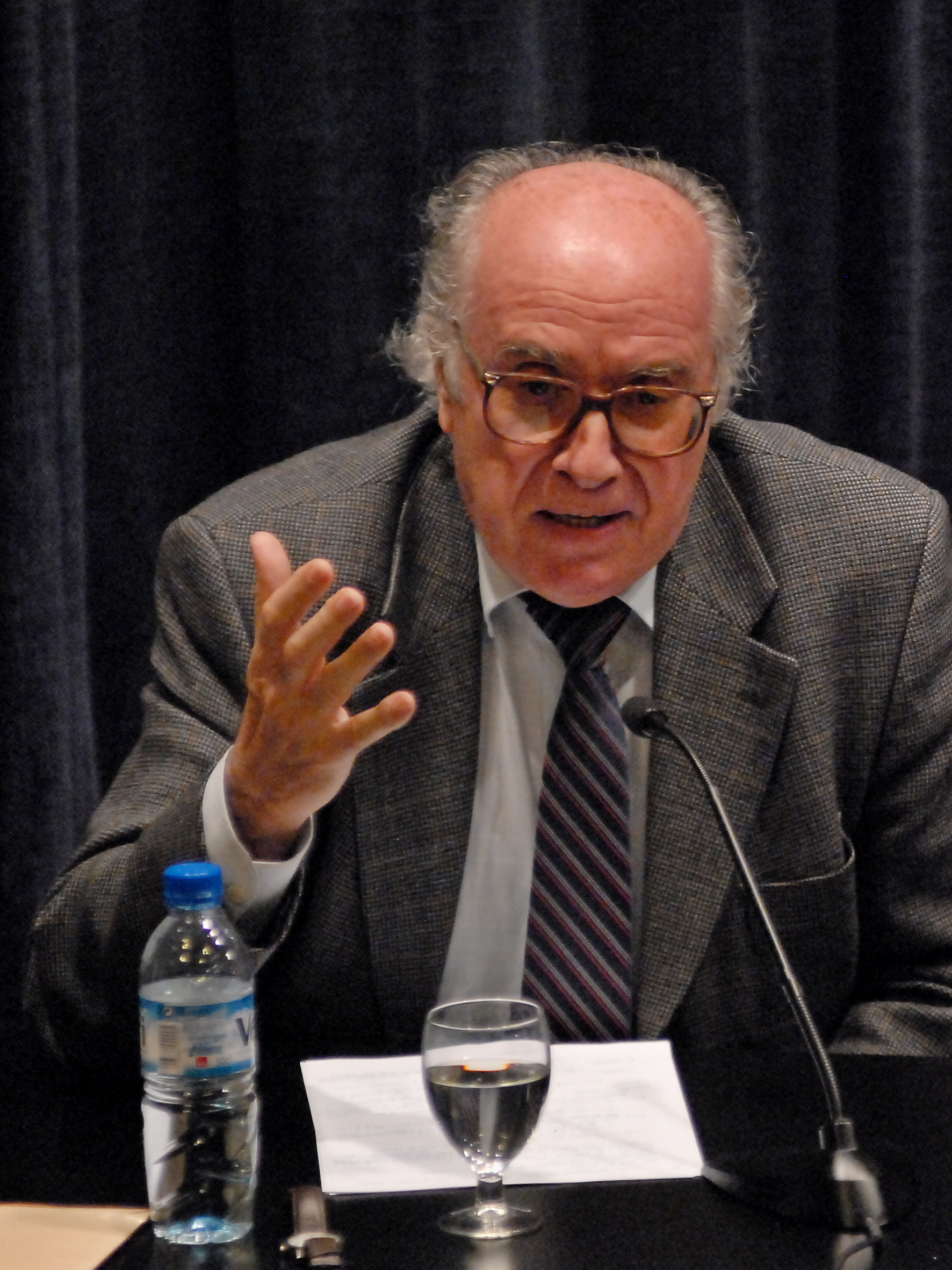 Lingüista